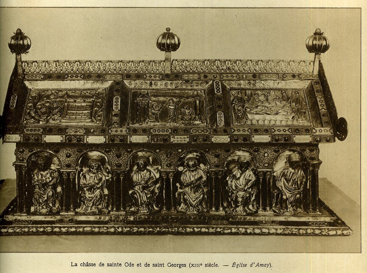 La châsse de sainte Ode et de saint Georges (13e siècle) église d'Amay